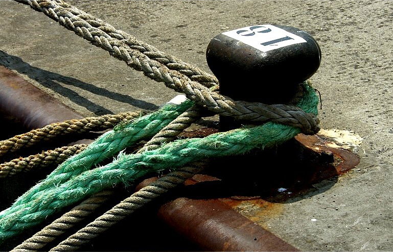 Norai no porto da Coruña